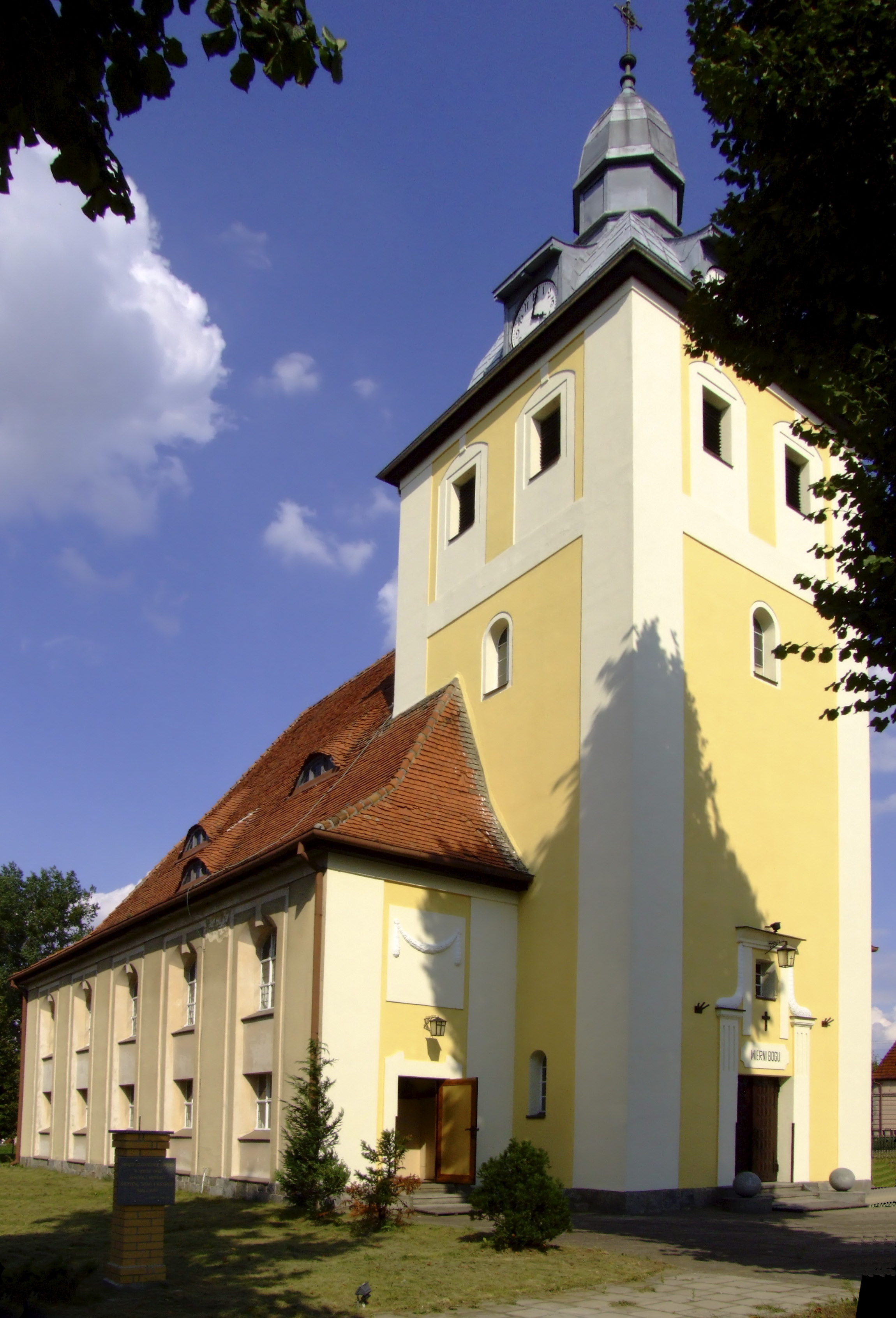 kościół ewangelicki, obecnie rzymsko-katolicki par. pw. św. Andrzeja Boboli z lat 1906-8 Sątopy, Nowy Tomyśl